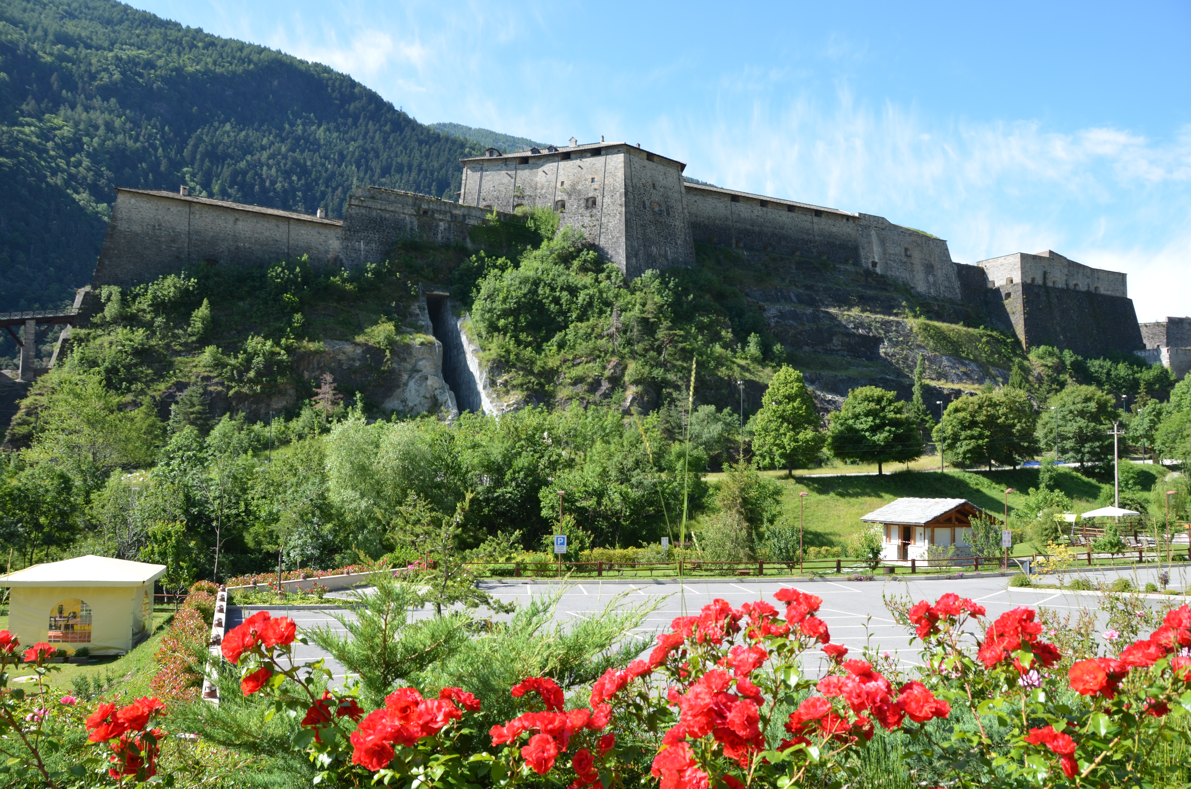 Fort d'Exilles